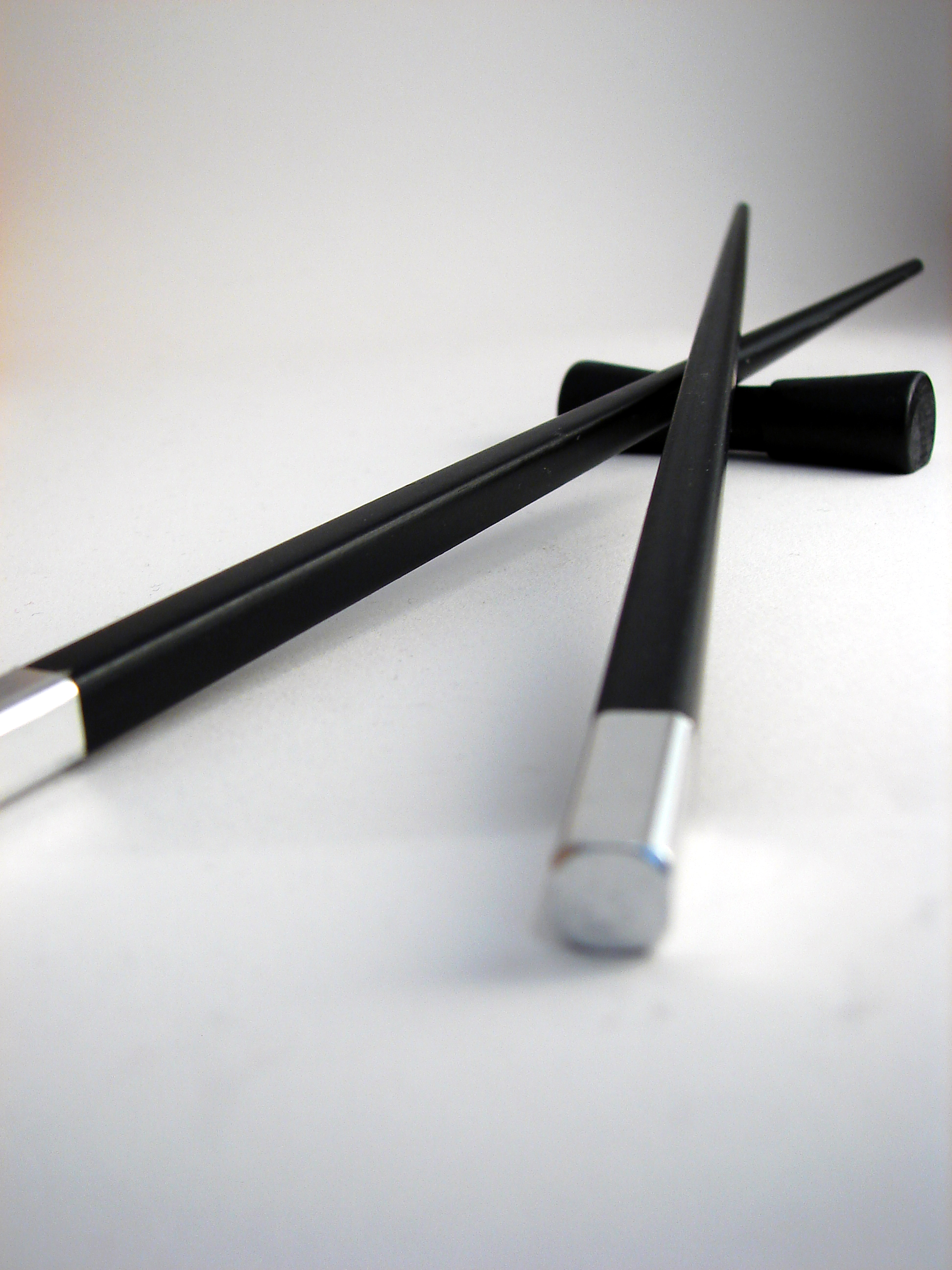 Bastonets xinesos, palillos chinos, chopsticks